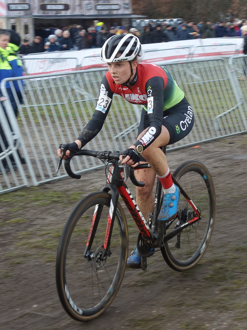 Superprestige veldrijden in de kuil van Zonhoven op zondag 8 december 2019